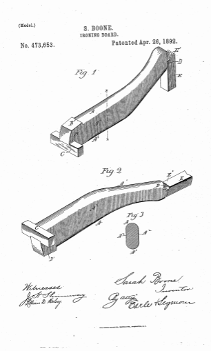 De Amerikaanse Sarah Boone was de uitvinder van een strijkplank die inklapbaar was. Zij vroeg op 30 december 1887 octrooi aan op een plank met ronde vorm, specifiek bedoeld voor het strijken van mouwen en de naden van dei mouwen. Het octrooi werd op 26 april 1892 verleend.